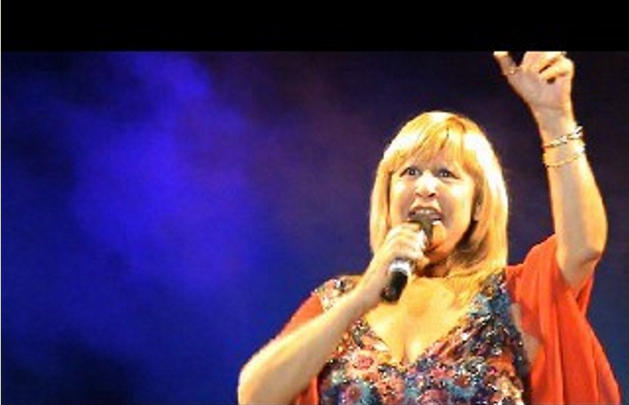 Cristina, que fue cantante del grupo español "Los Stop", cantando en solitario en un concierto en Badajoz